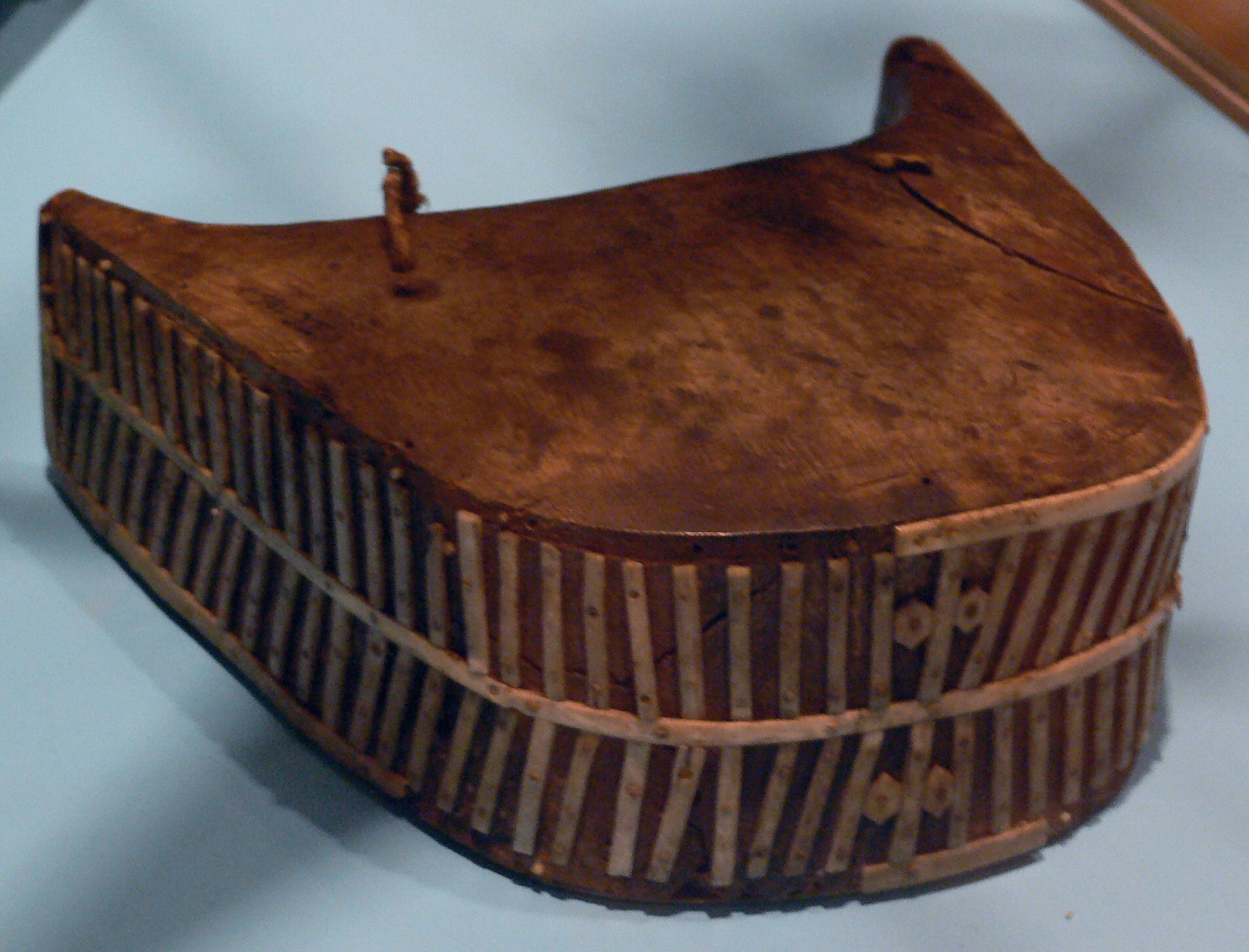 Stuttgart, Linden-Museum Augenschirm (gegen Schneeblindheit), Holz, Walrosszahnbein, Leder; Ostgrönland, 1884